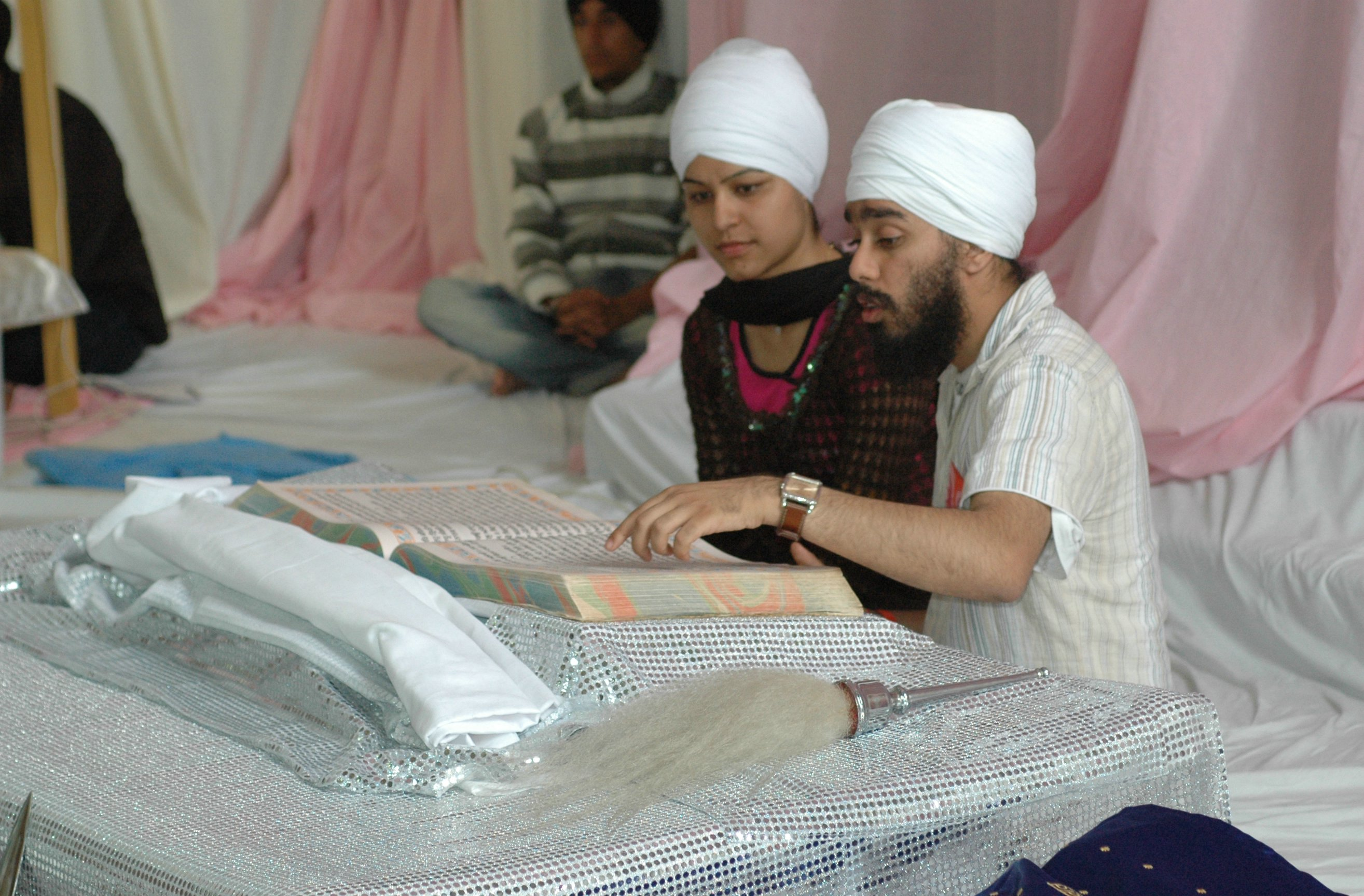 Gurbani Darshan, Sikhism